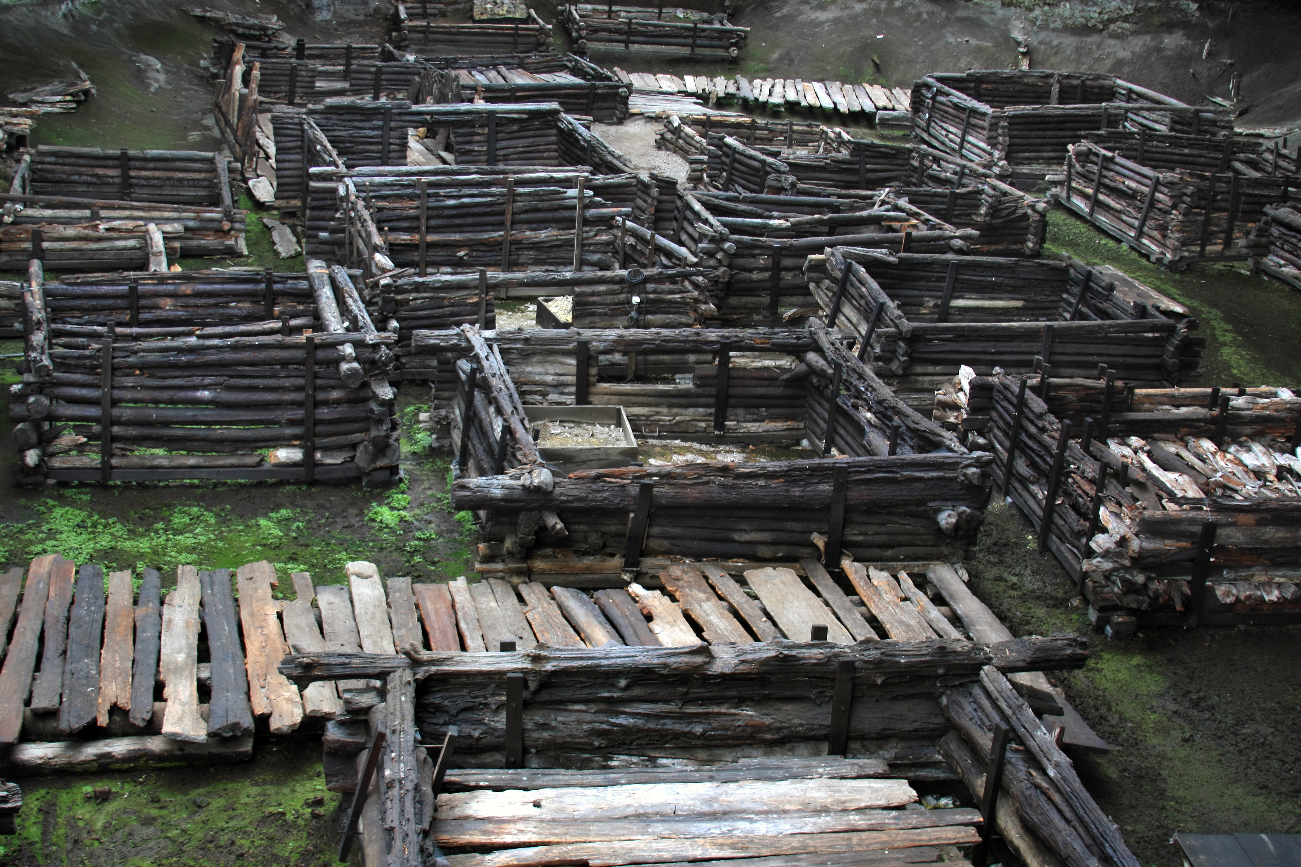 Algselt kaitses Bresti linna 11. sajandil ehitatud puidust linnus. Arheoloogilistel kaevamistel paljastus 4 meetrise kultuurkihi alt kaks tänavat ja elamute puidust seinad.